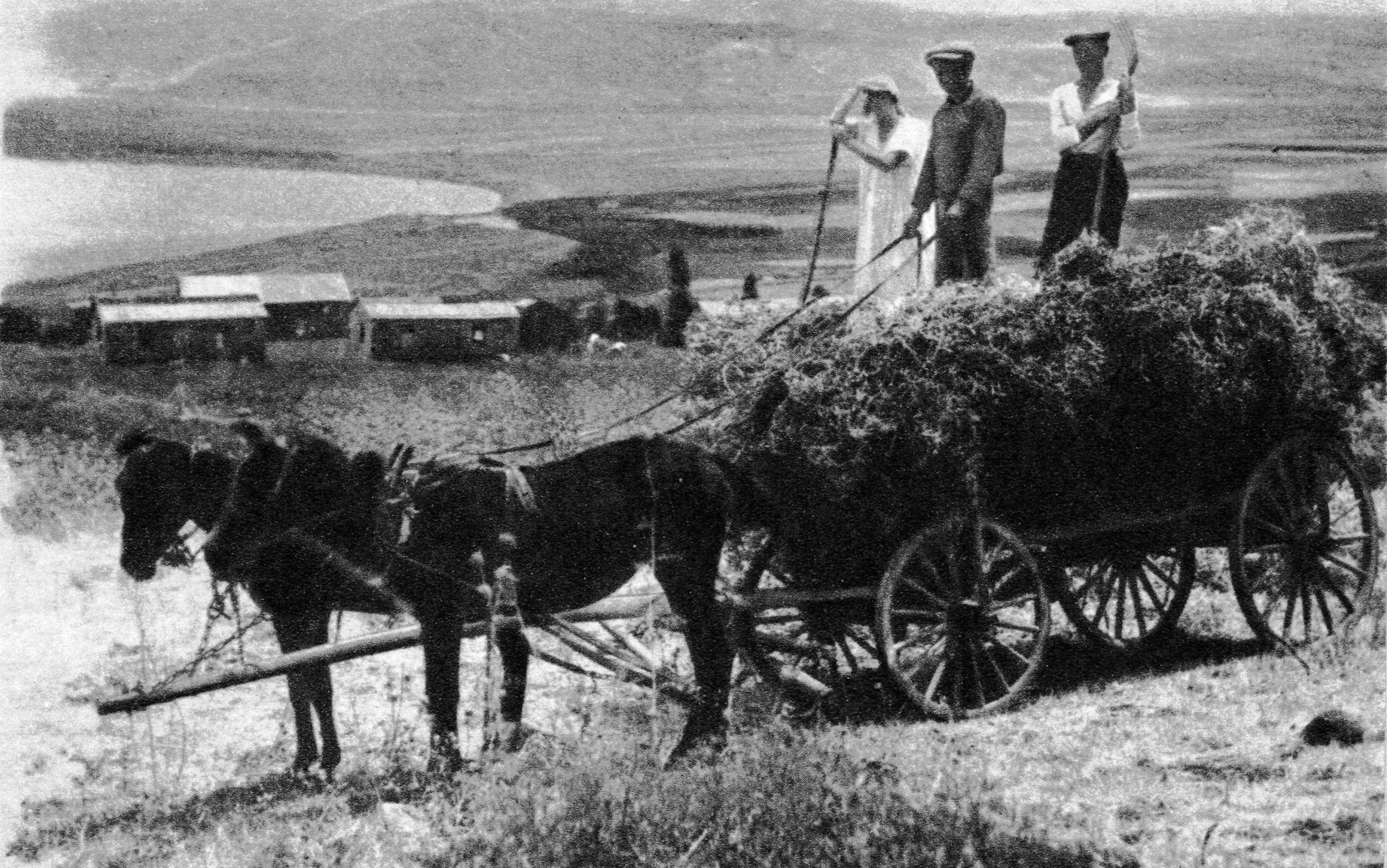 קבוצת הטבעוניים בהתיישבות הר כנרת שהייתה התיישבות ברכס פוריה בין השנים 1930-1920 ברקע צריפי ההתיישבות